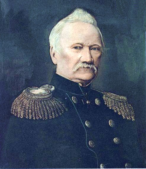 Илья Петрович Чайковский (отец П.И.Чайковского)